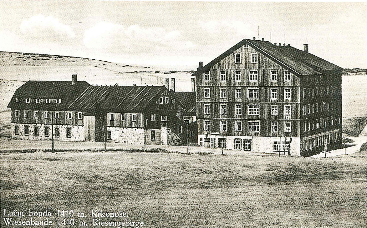 Wiesenbaude im Riesengebirge ca. 1930